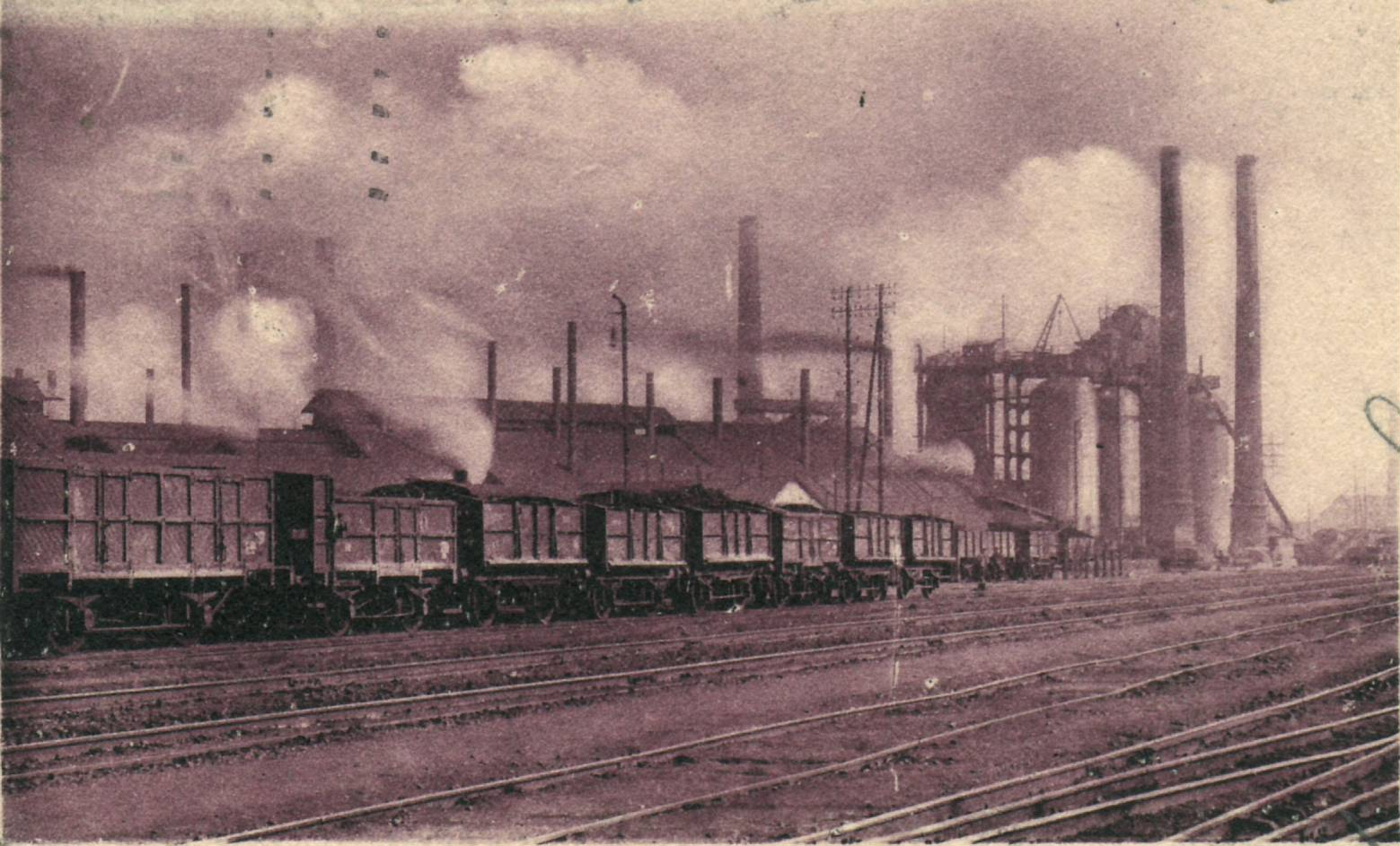 Détail d'une carte postale ancienne éditée par Woelfflé n°10 ANZIN - Les Hauts-Fourneaux